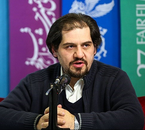 رضا خسروی در نشست خبری فیلم زهر مار ۱۴ بهمن ۱۳۹۷